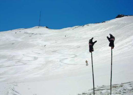 مسیر اصلی پیست